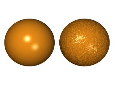 Mapowanie wypukłości (przykład, POV-Ray)